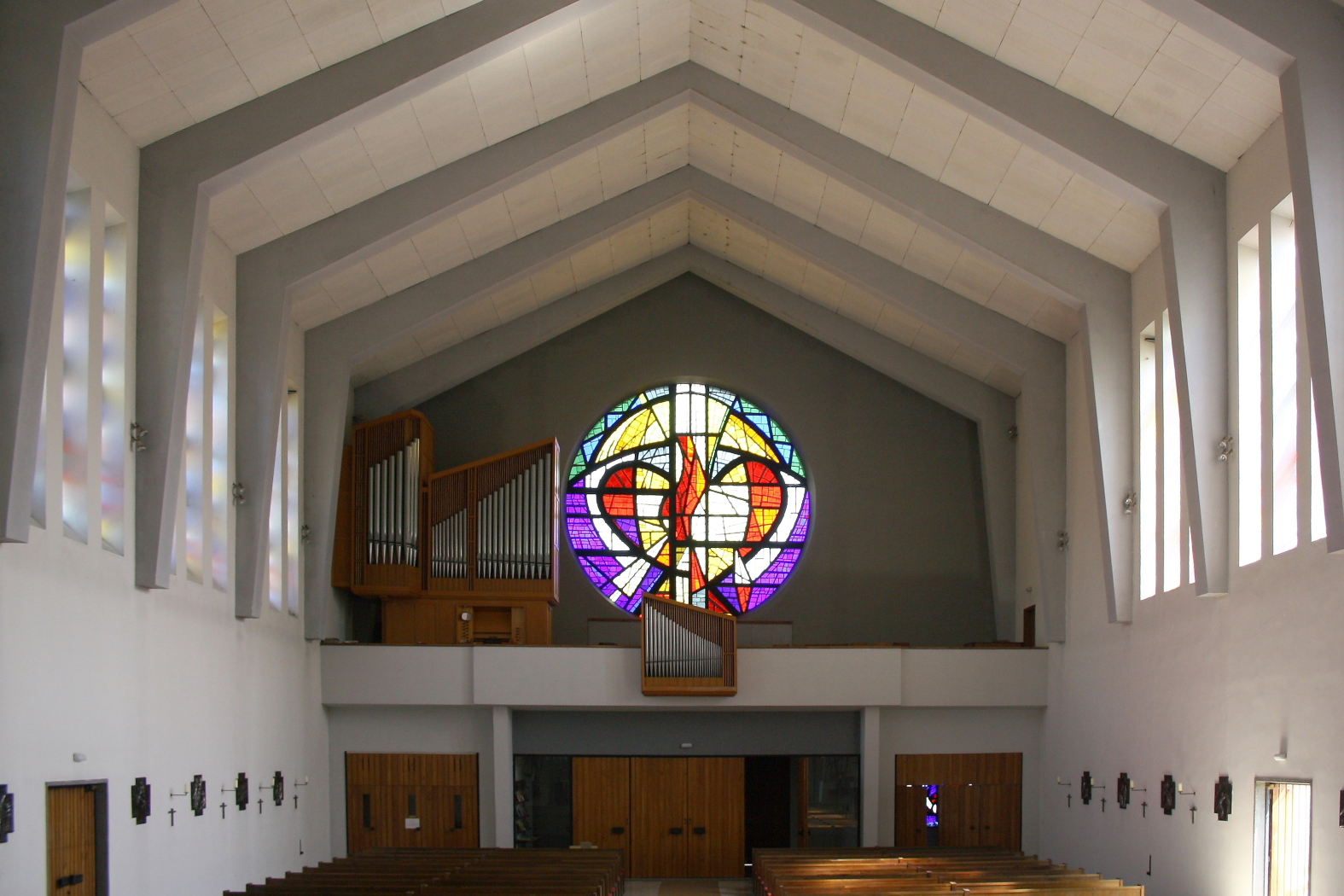 Innenansicht der Pfarrkirche der niederösterreichischen Gemeinde Traisen Richtung Orgelempore. Fensterrosette von Robert Herfert